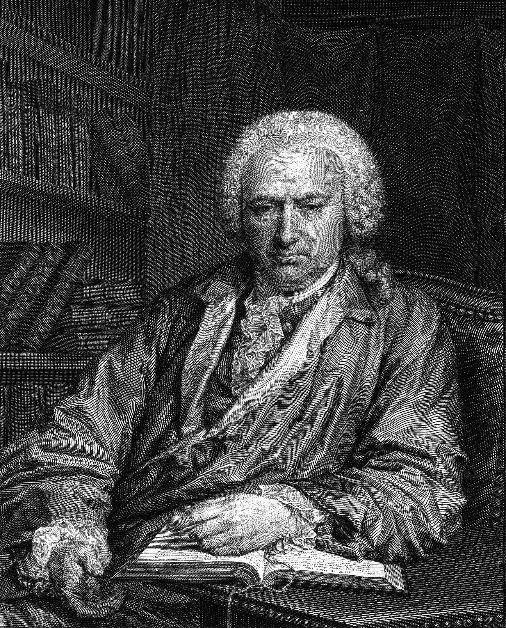 Portrait of Charles Bonnet (1720-1793)